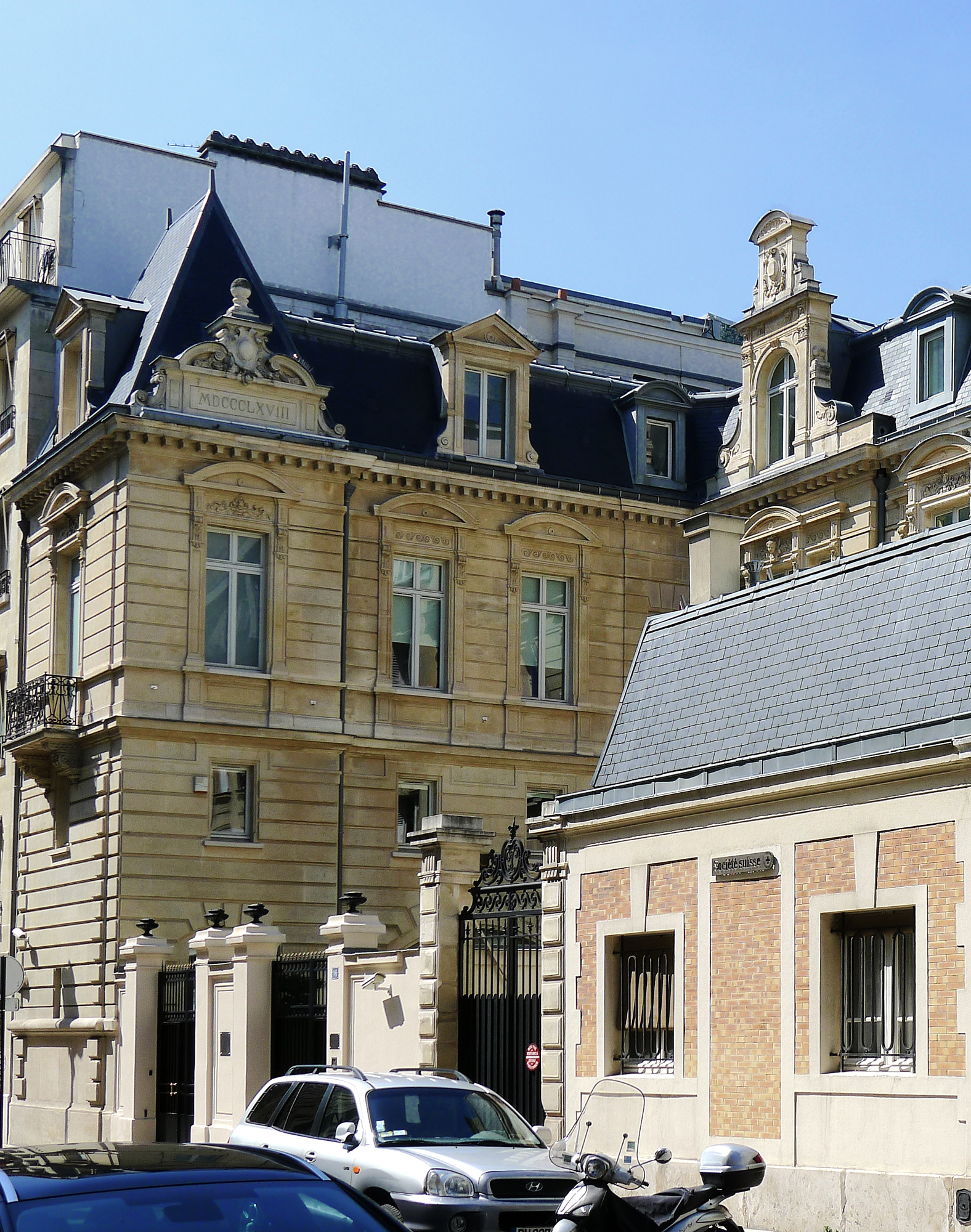 Rue Murillo (n° 16) - Paris VIII